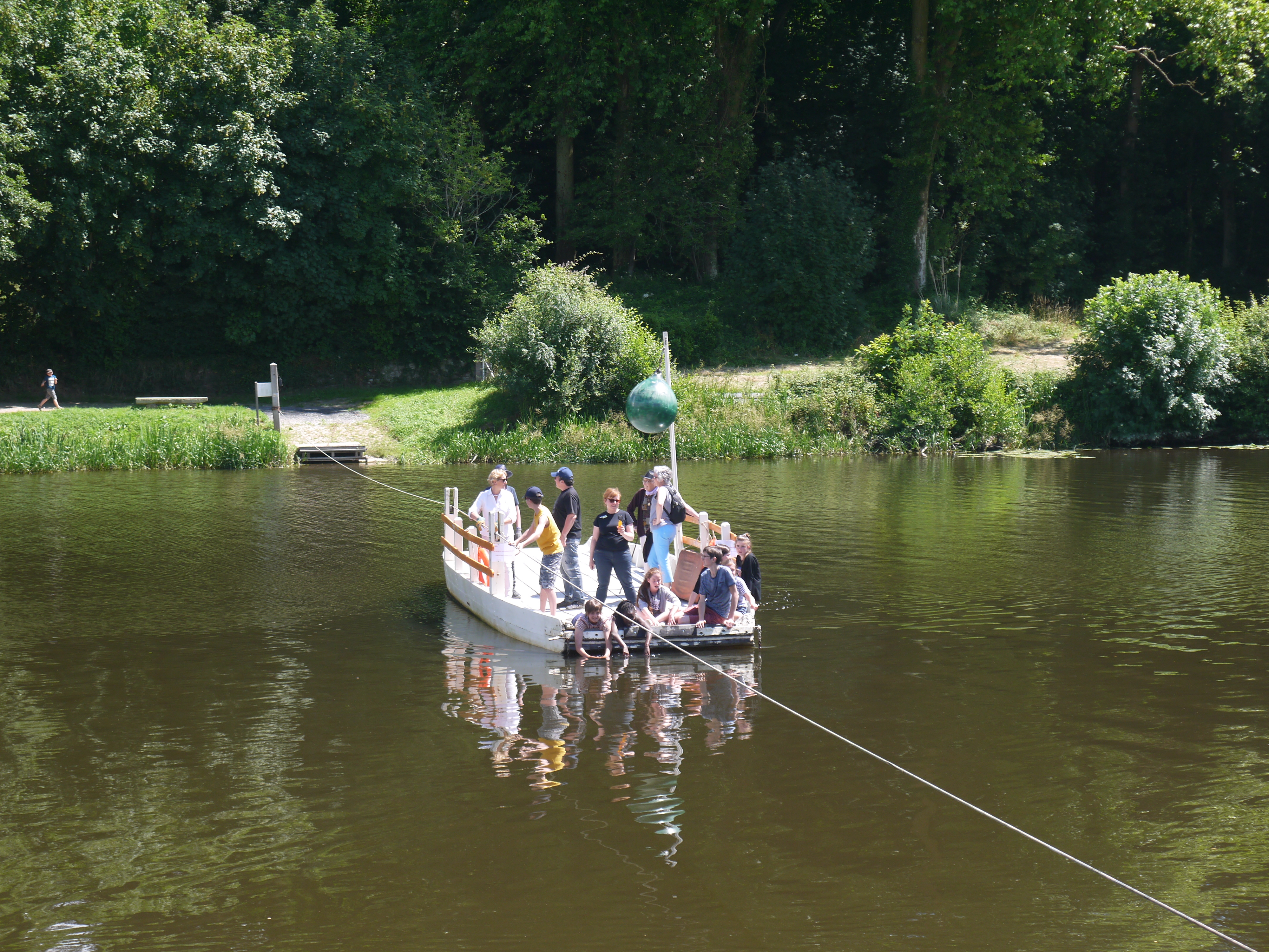 Le bac sur la Mayenne, se mouvant manuellement.